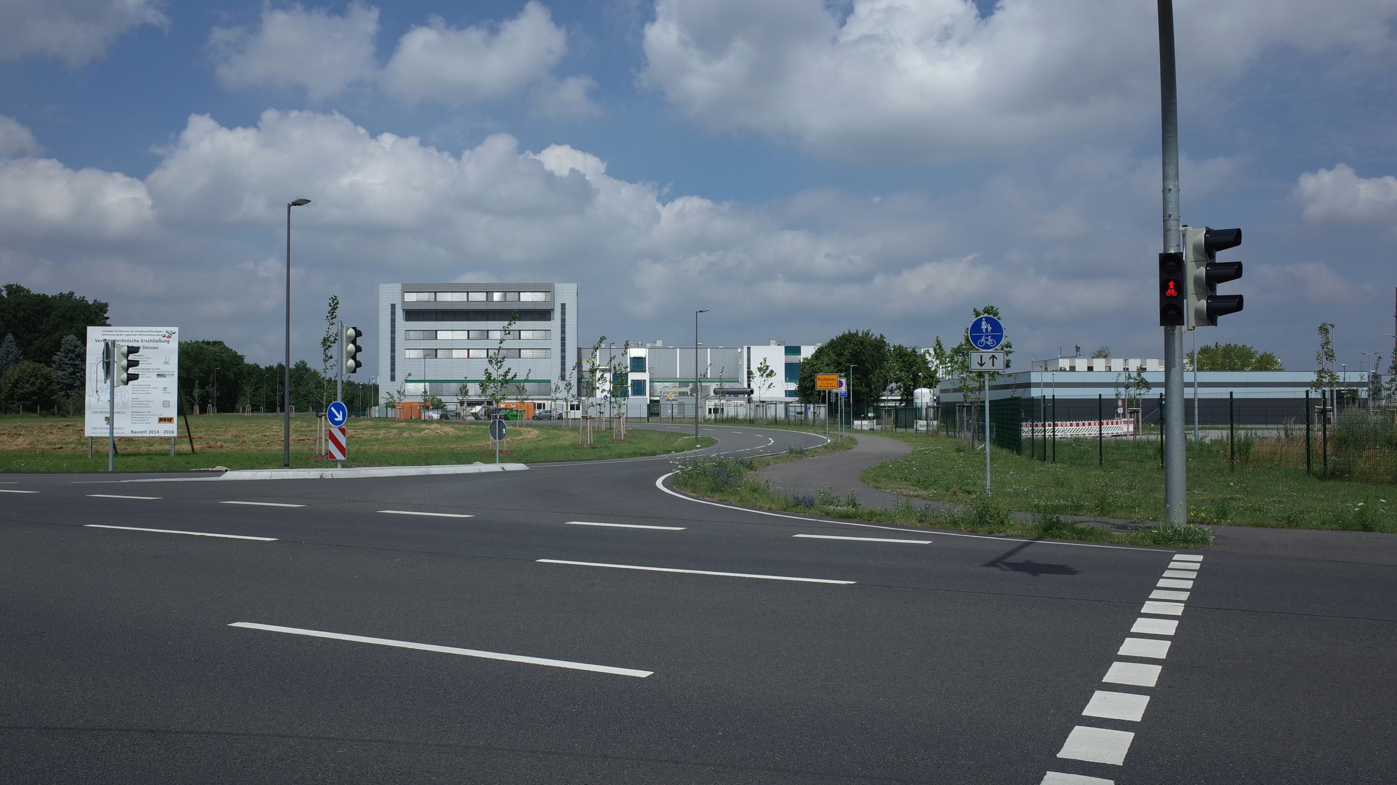 Stadt Dessau-Roßlau, Rodleben Ortsteil Tornau. Neue Straße zum BioPharmaPark.